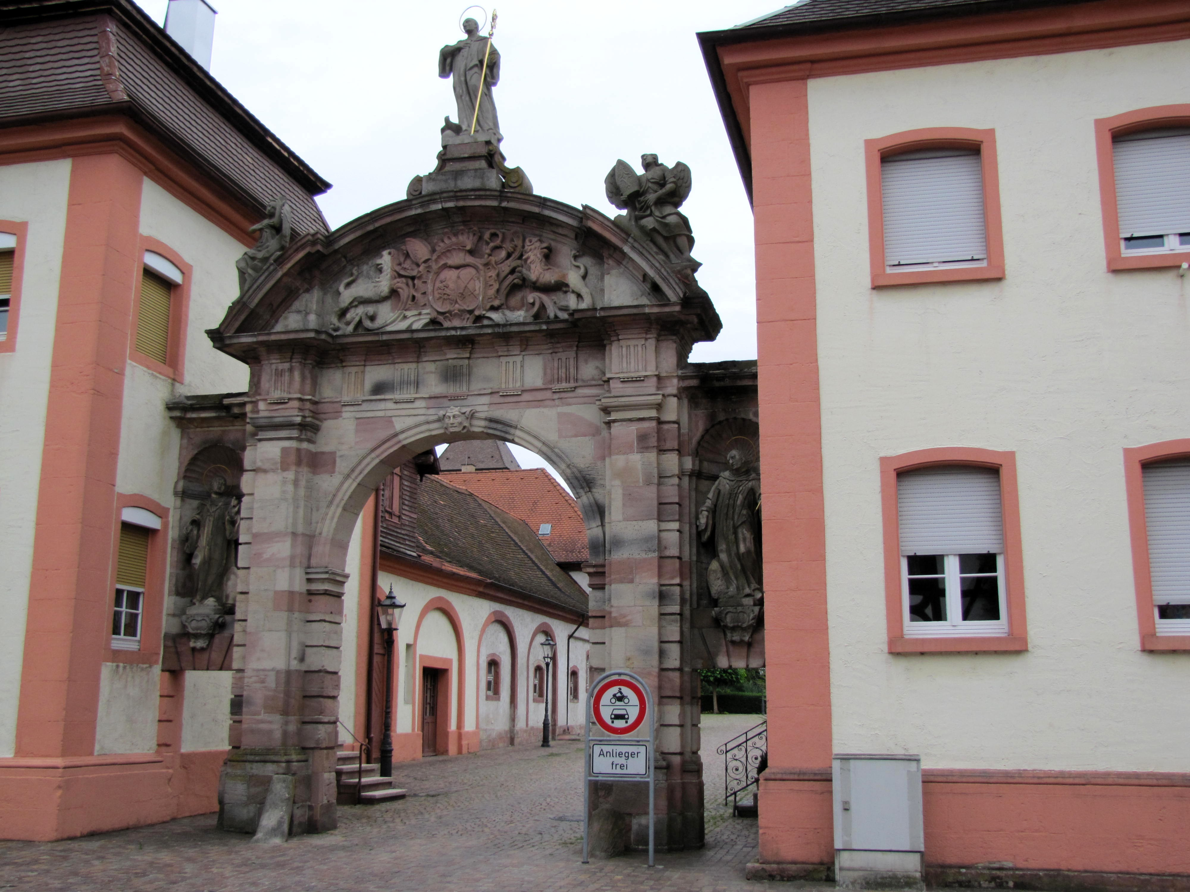 Baden-Württemberg, Rheinmünster, Abtei Schwarzach, Klosterportal mit Benedikt